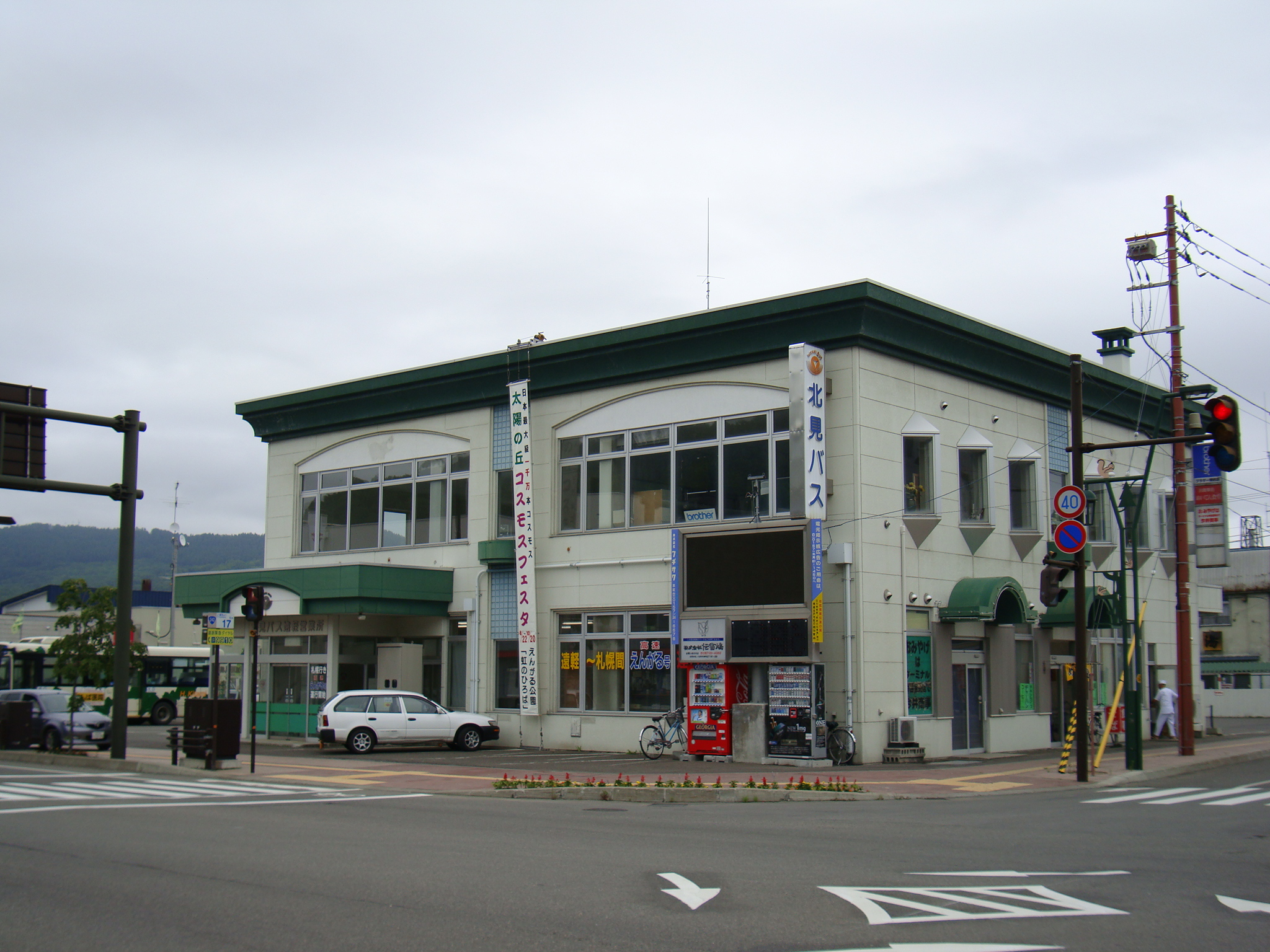 Engaru depot